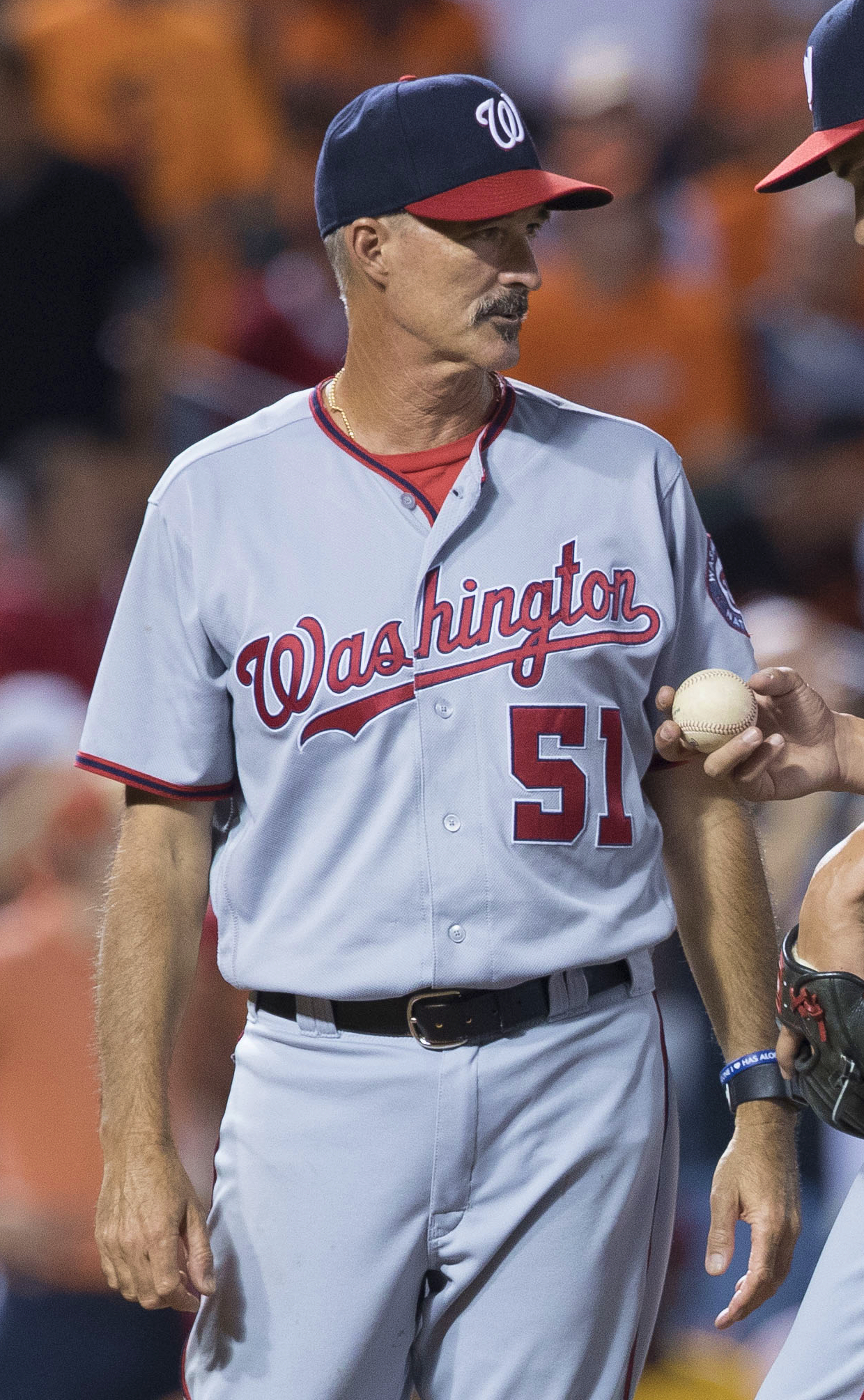 Mike Maddux